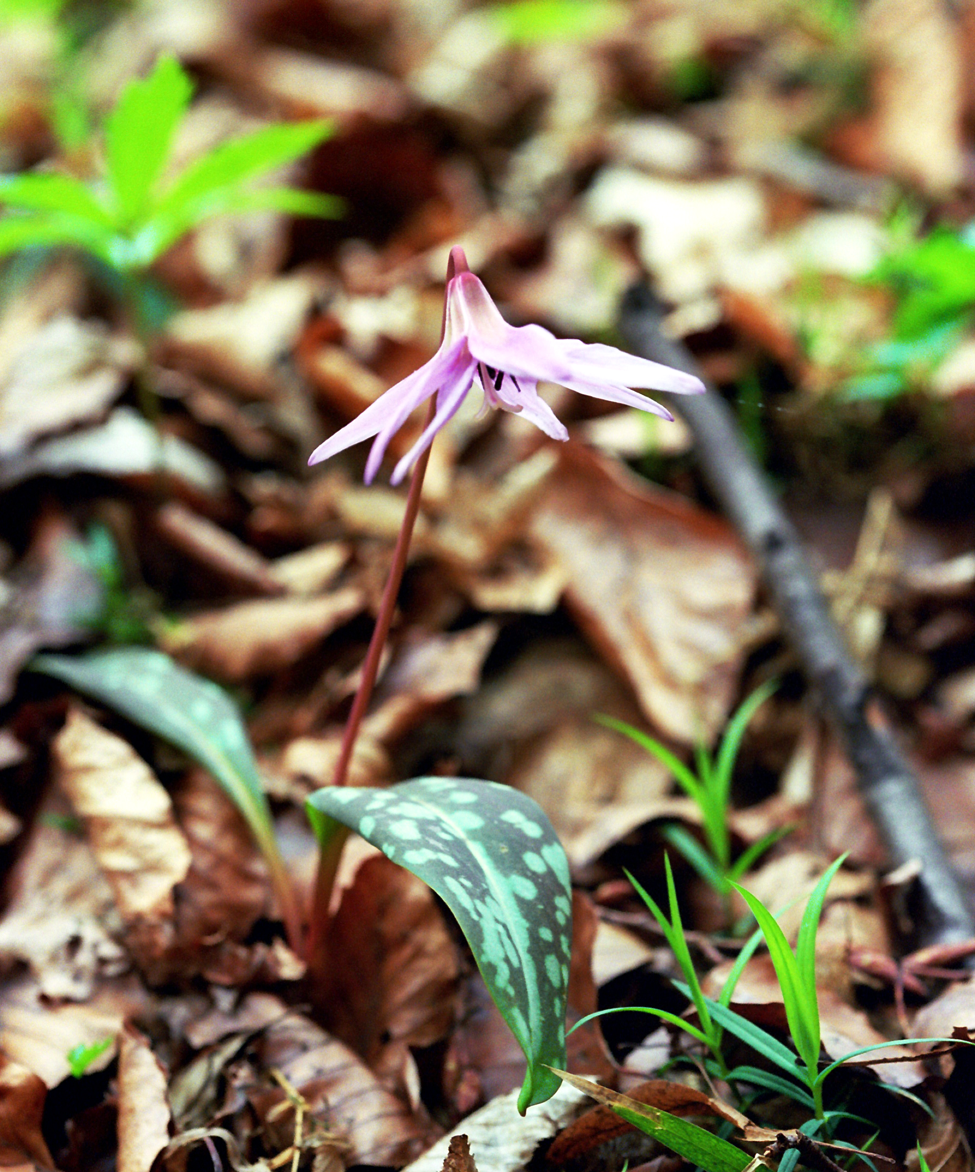 Kandík psí zub, lokalita Medník